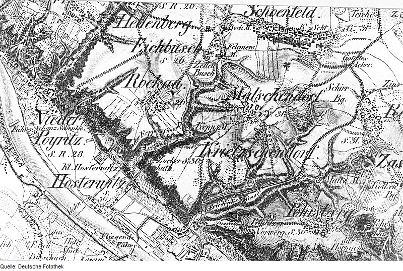 Original image description from the Deutsche Fotothek Dresden-Borsberg. Oberreit, Sect. Dresden, 1821/22